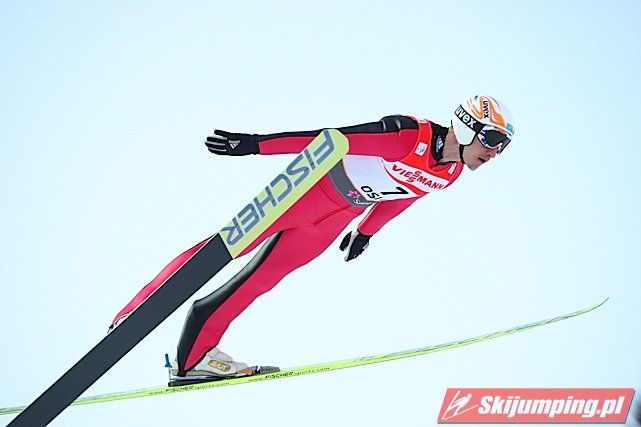 Nikołaj Karpienko podczas serii treningowej przed konkursem indywidualnym mężczyzn na Mistrzostwach Świata w Narciarstwie Klasycznym 2011 w Oslo.